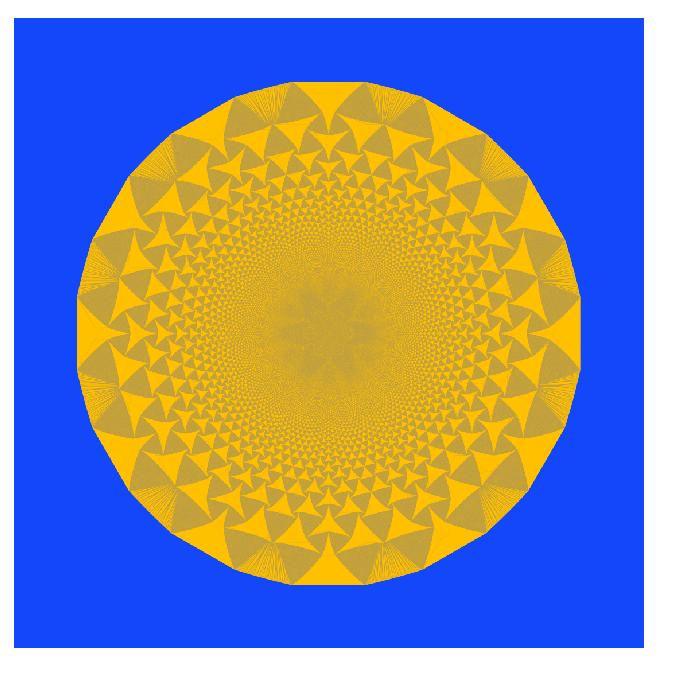 ASM en una malla de caras pentagonales.